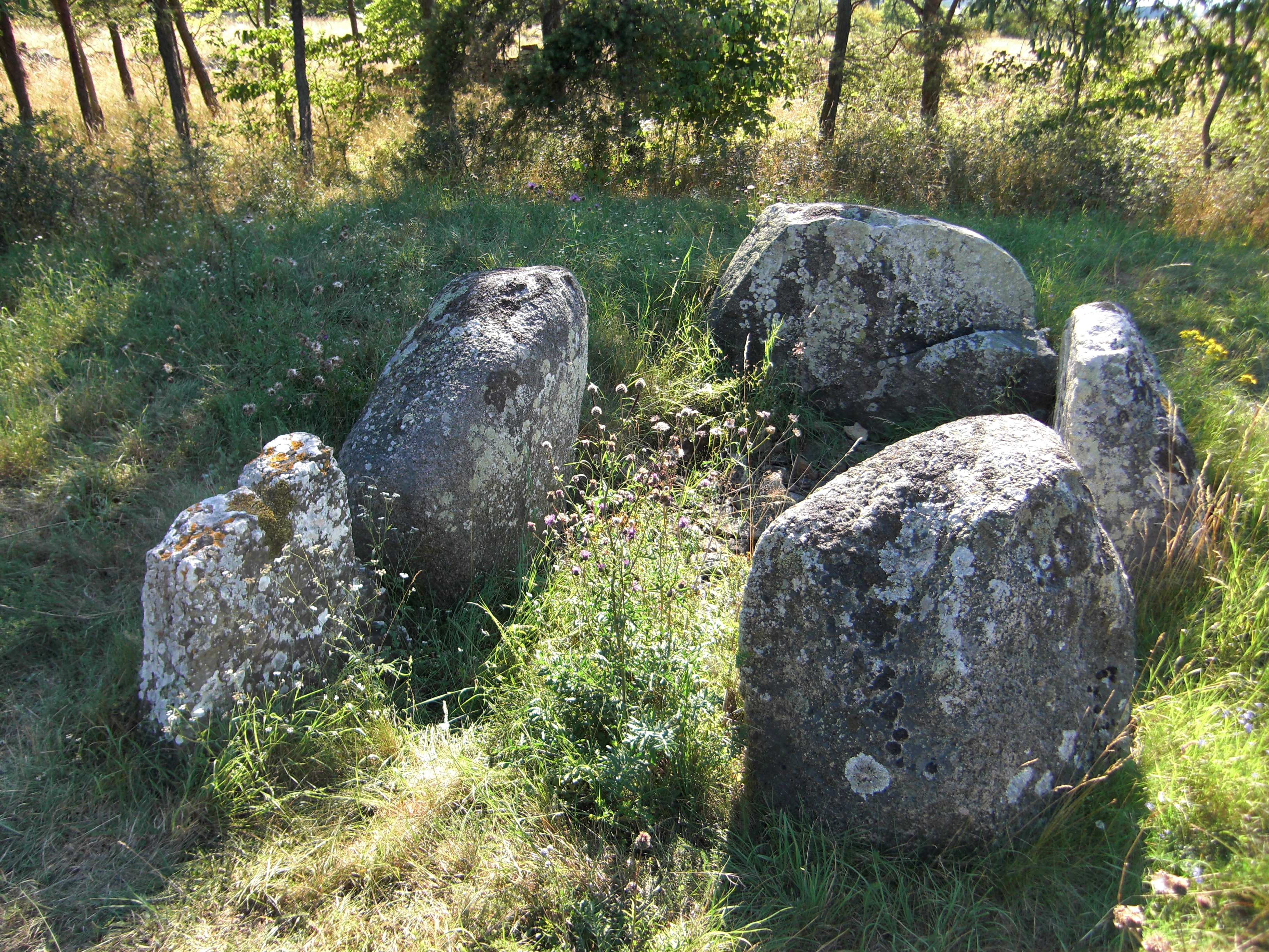 Dös eller obestämd stenkammargrav (Raä-nr Resmo 32:1) i Resmo socken, Mörbylånga kommun, Öland, Kalmar län, Sverige.